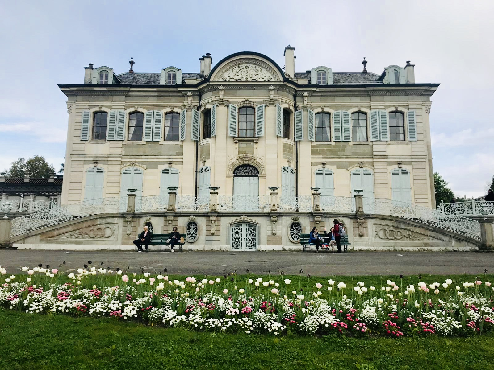 Photo de La Villa La Grange prise de devant avec un jardin de fleurs